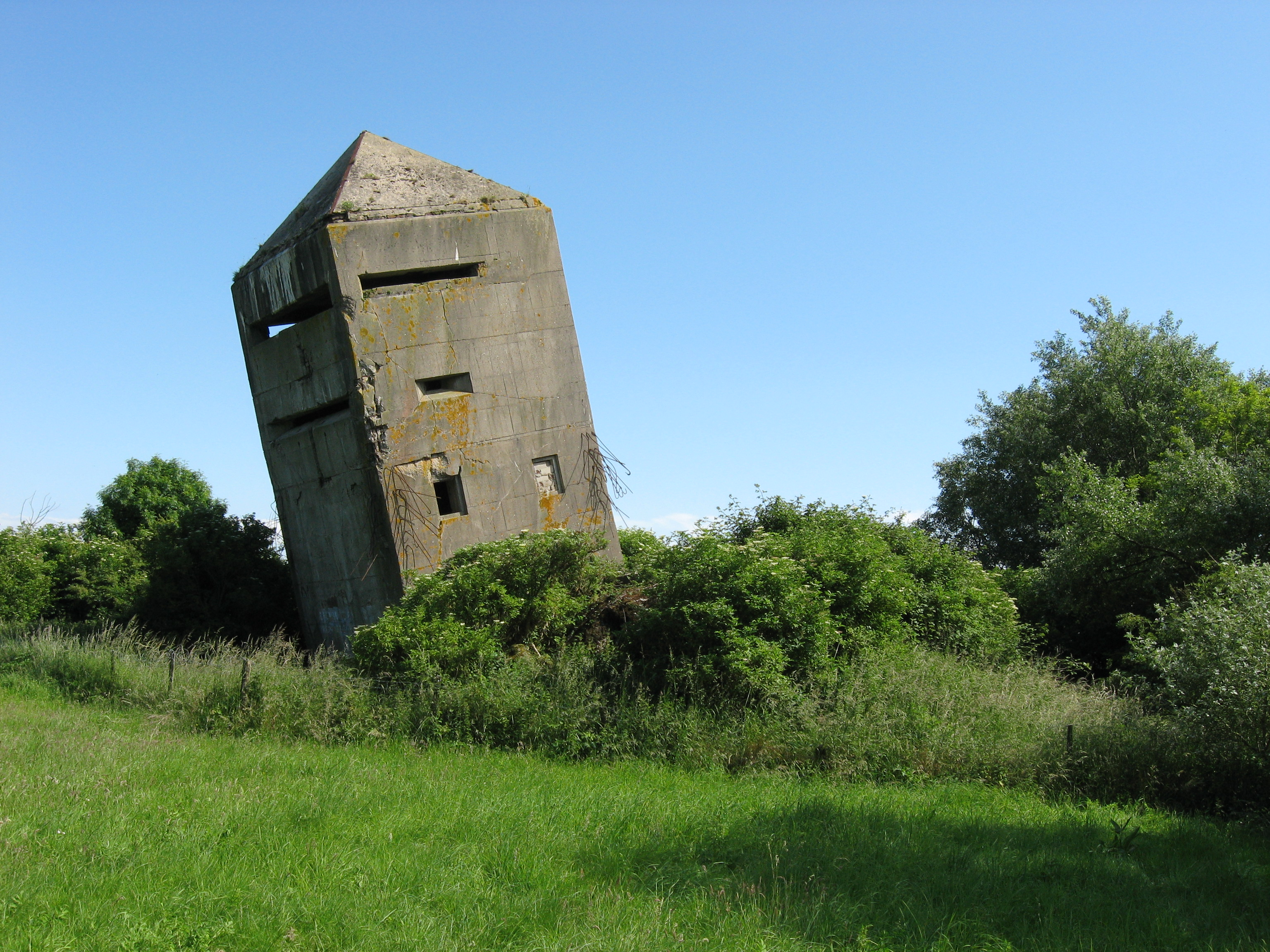 Blockaus de la seconde guerre modiale